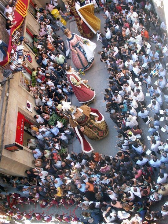 Gegants de Solsona fent la ballada final davant l'Ajuntament.